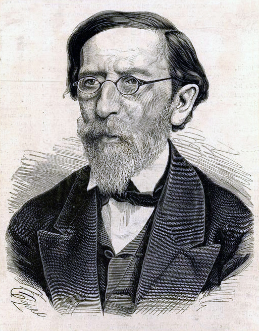 Михаил Александрович Максимович, ботаник, этнограф, фольклорист. Ректор университета св. Владимира.